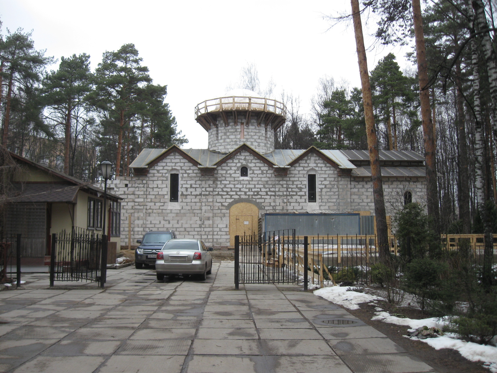 Строительство каменного здания храма Священномученика Владимира в г. Королёве (апрель 2015)